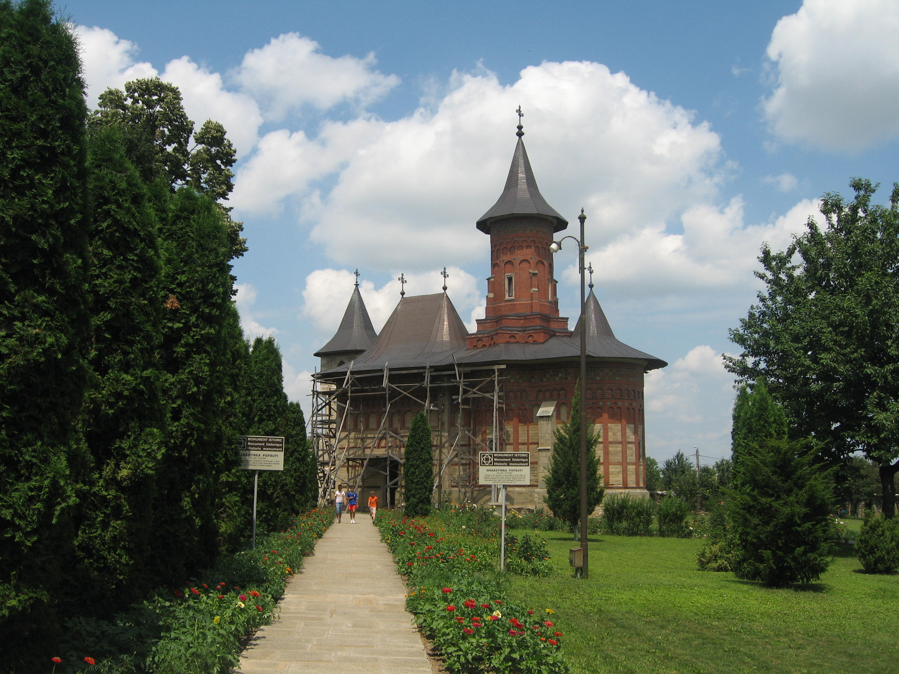 Mănăstirea Popăuţi